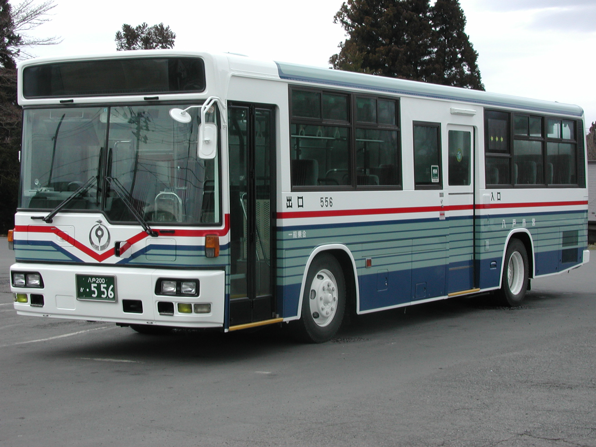 八戸市交通部 いすゞ・キュービックワンステップ(西工架装/KC-LV280N/中古による購入)